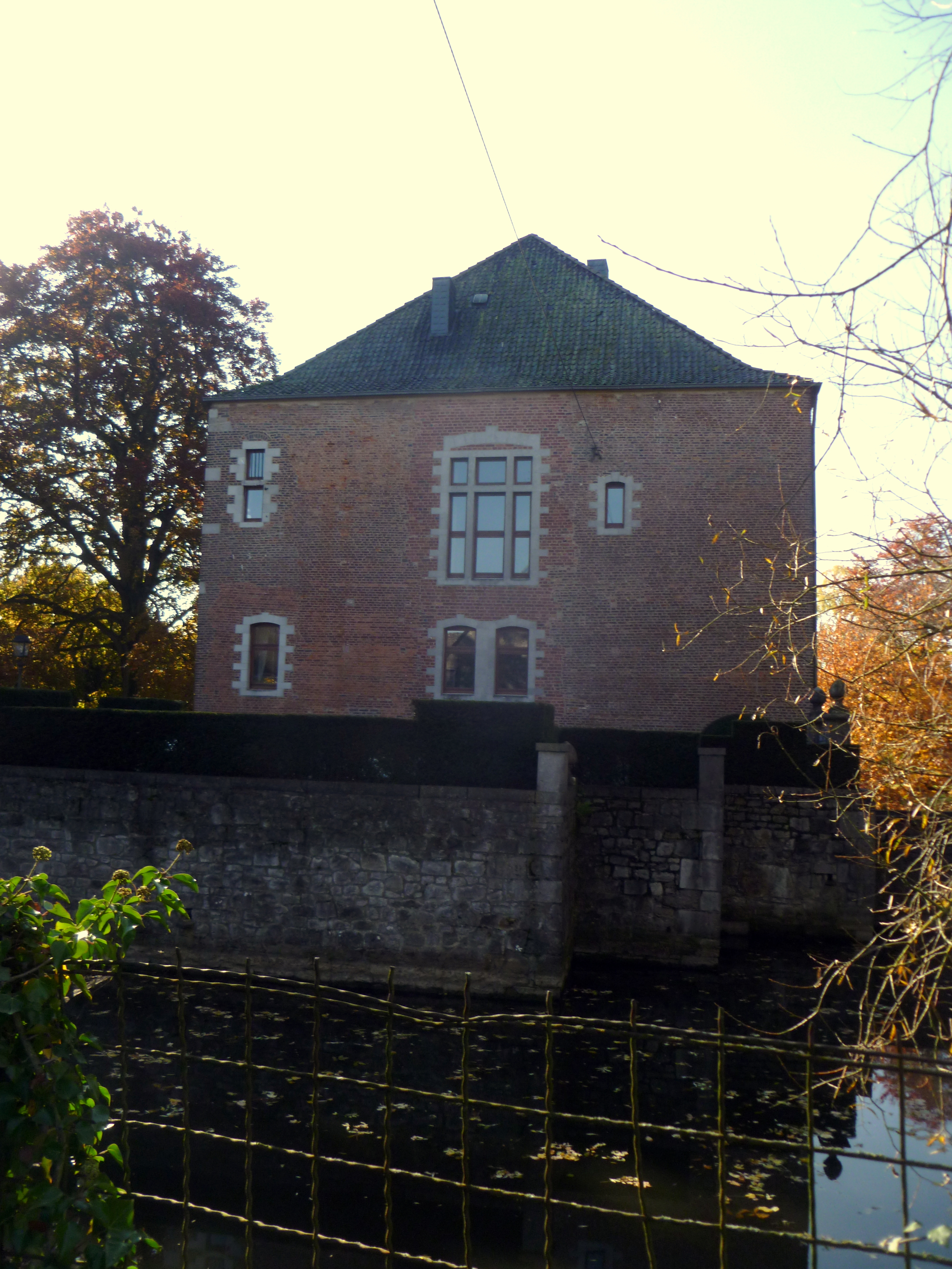 Seitenansicht von Schloss Waldenburg, Kettenis